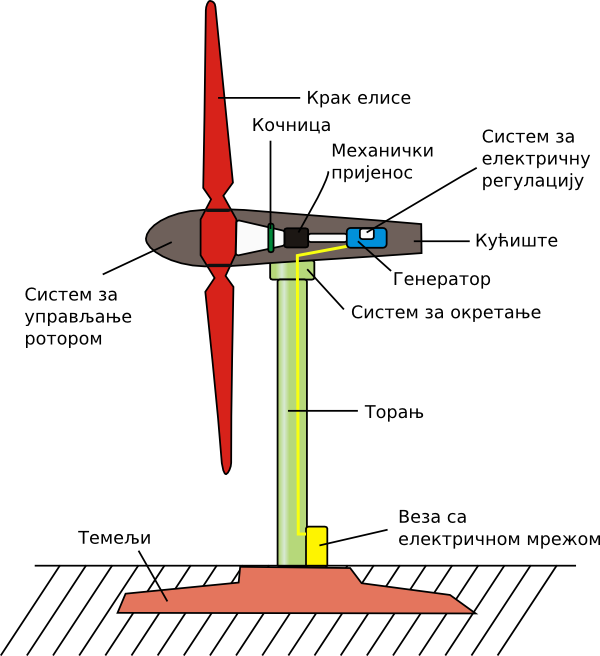 Wind turbine, Serbian text. Вјетроелектрана, текст на српском.